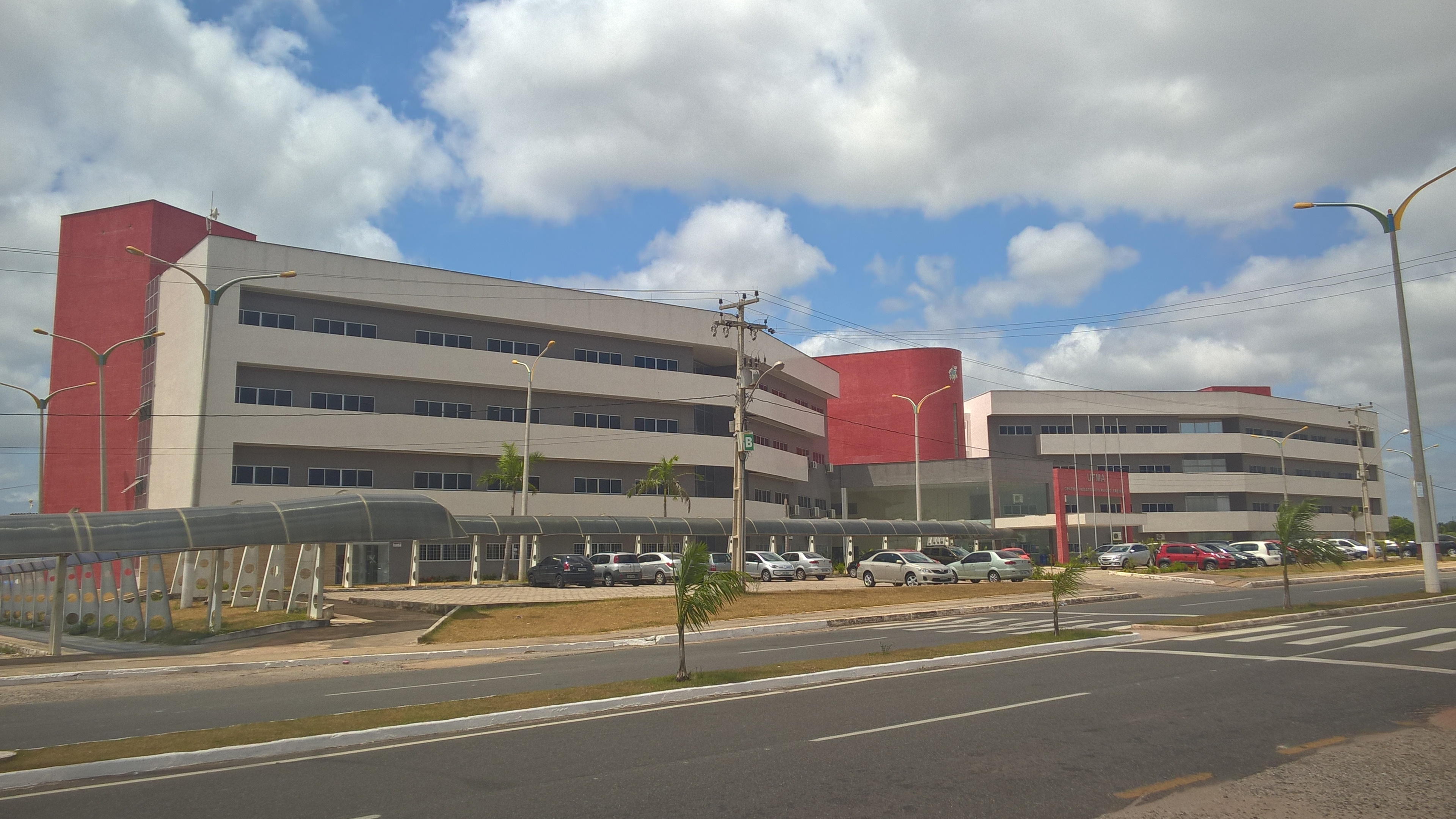 Centro Pedagógico Paulo Freire, edifício localizado em São Luís, MA - Brasil.